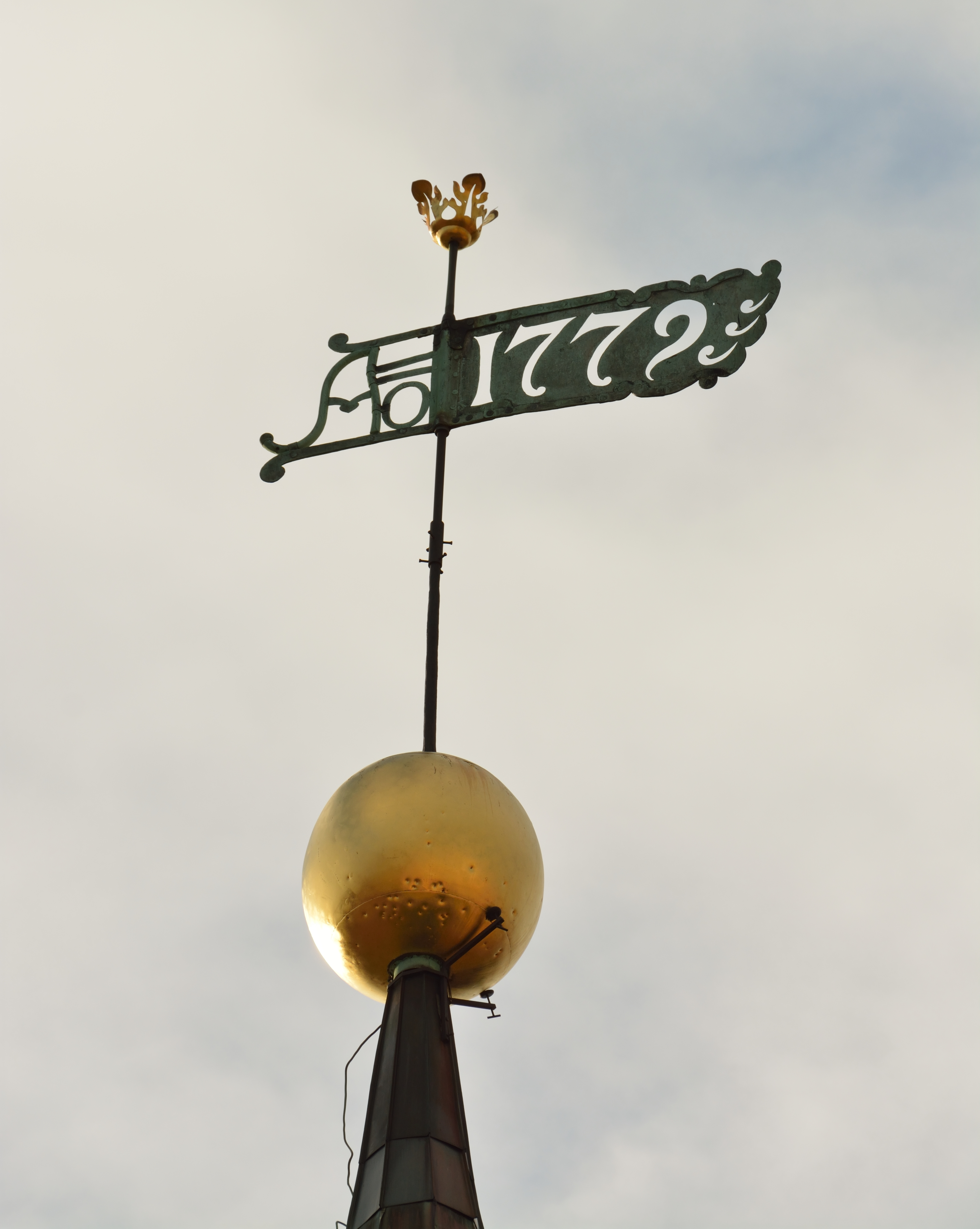 Tallinna Toomkiriku torni muna ja tuulelipp